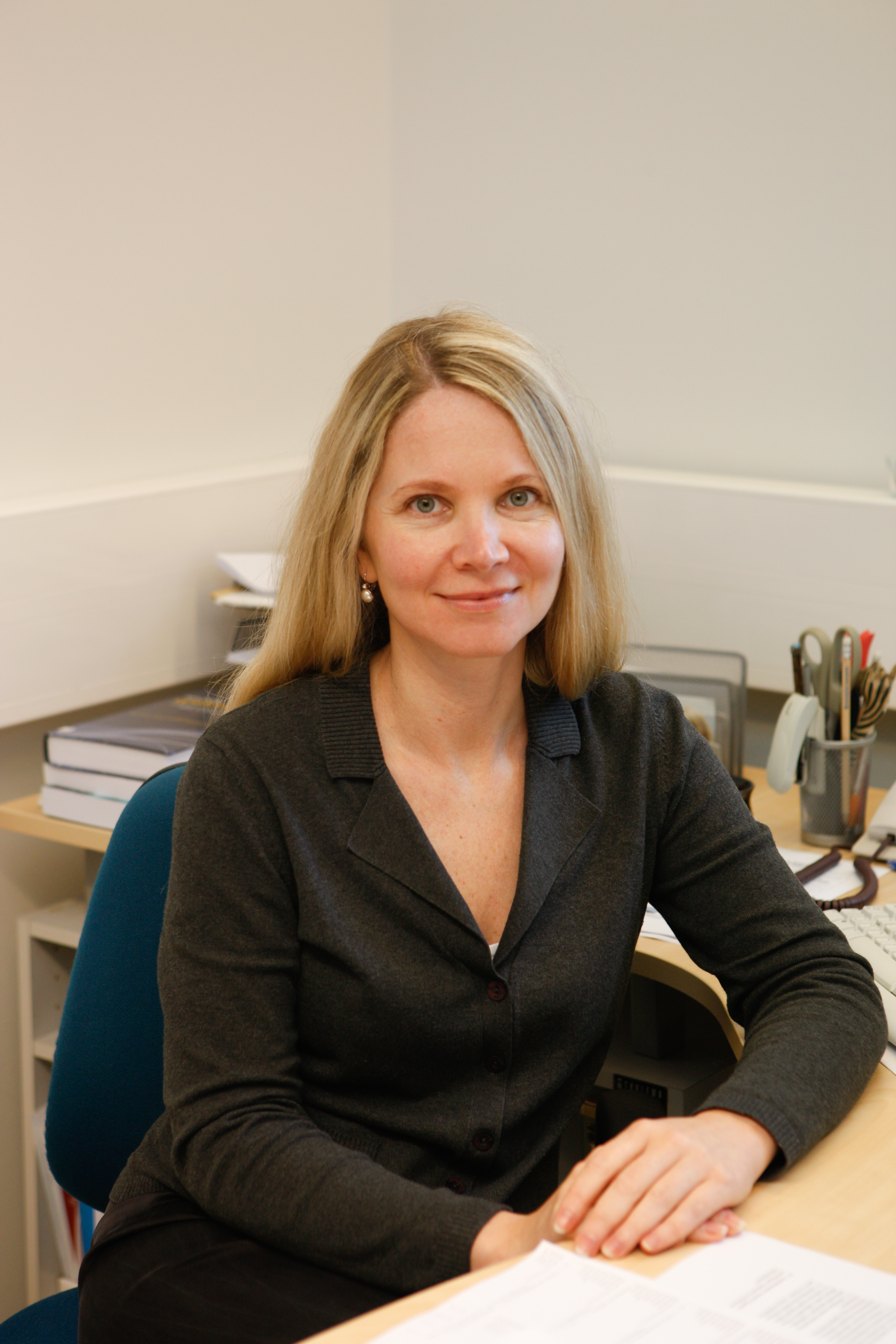 Tartu Ülikooli Tervishoiu instituut. Epidemioloogia professor Anneli Uusküla.